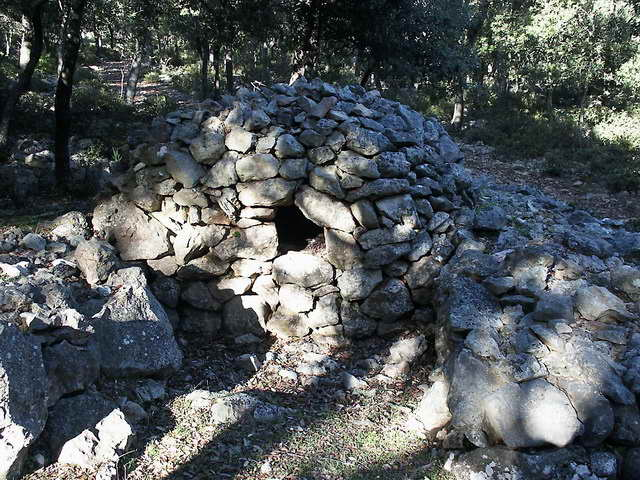 Forn. Valldemossa. Mallorca.